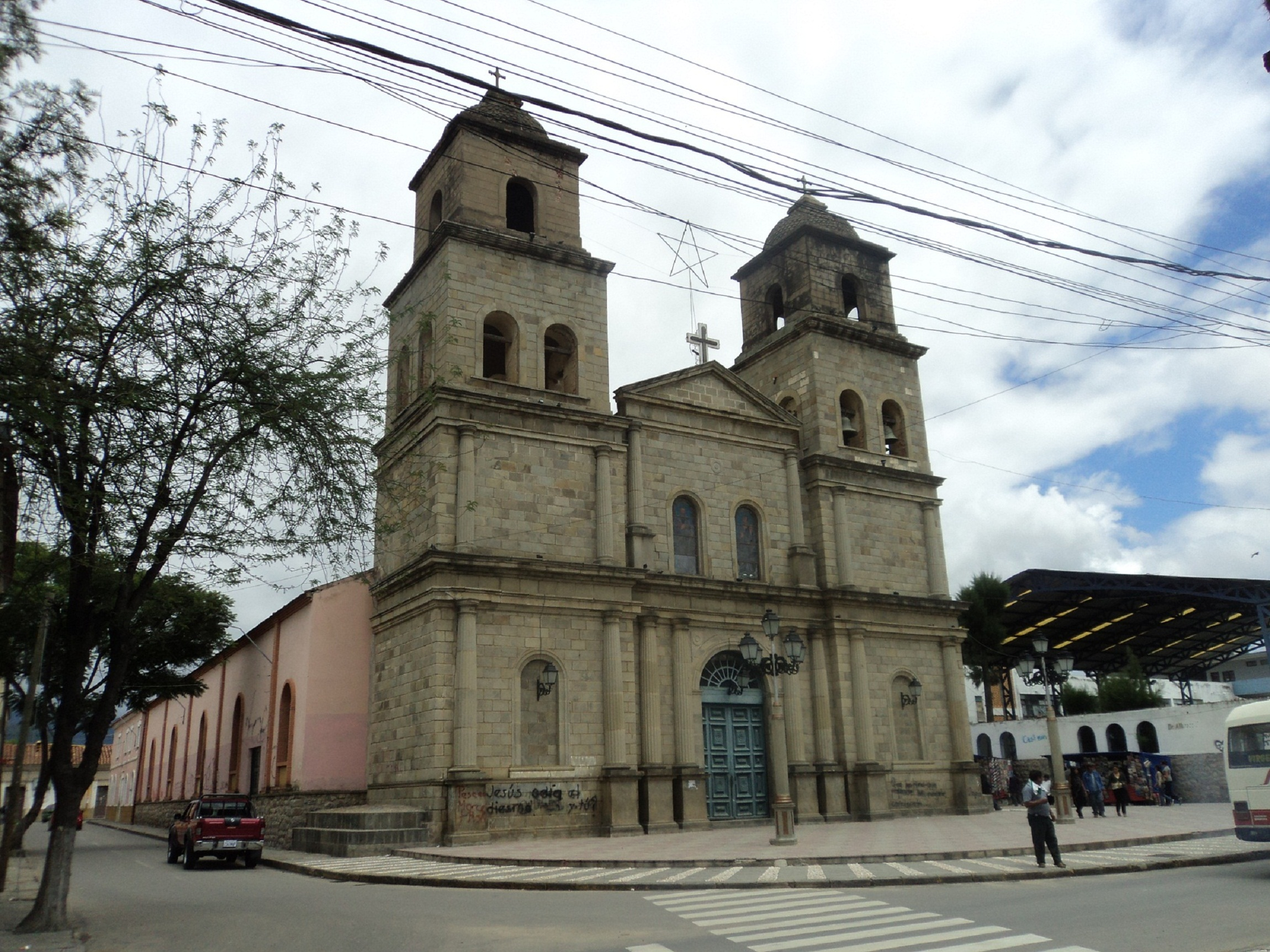 La Catedral de Tarija, Bolivia